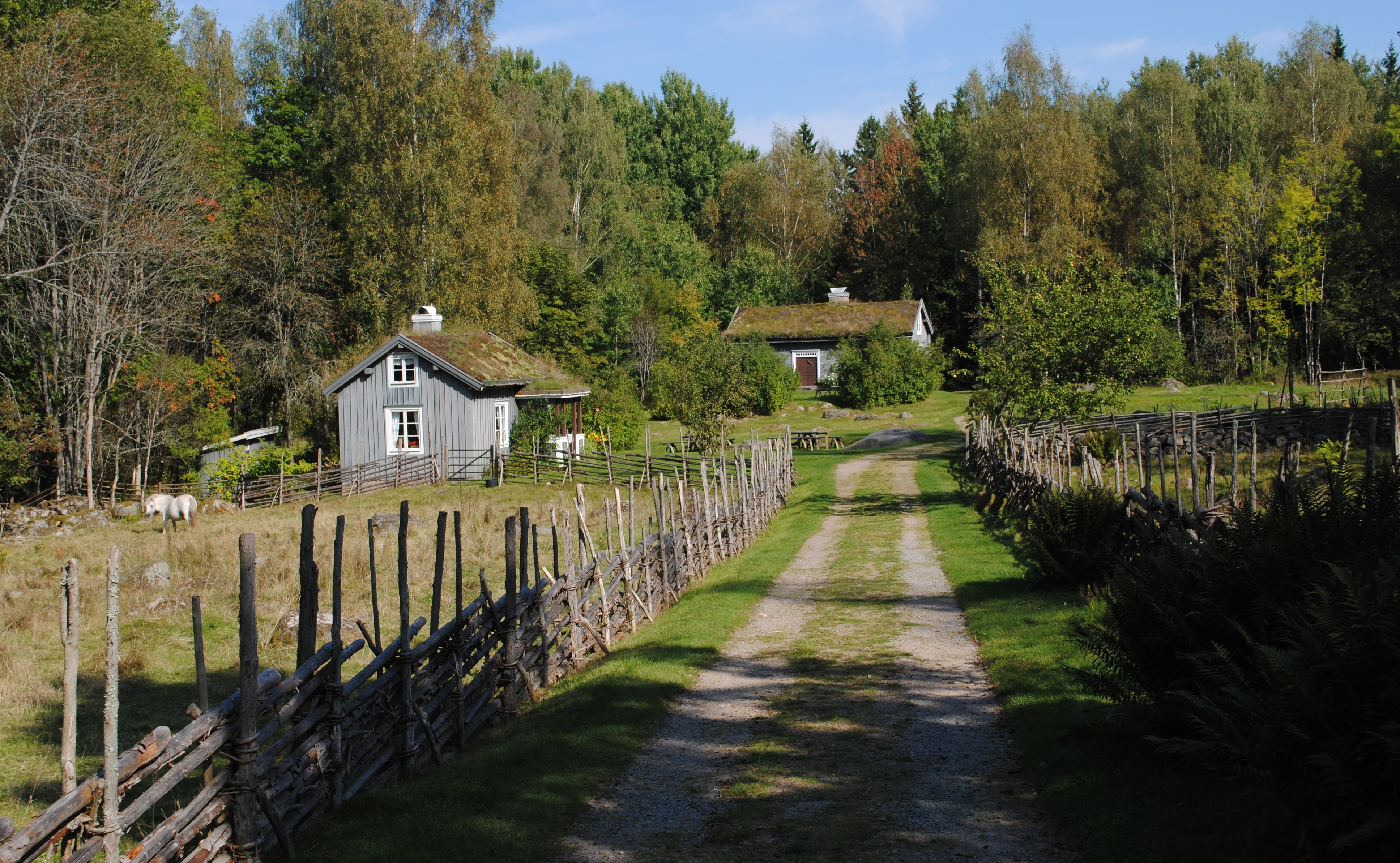 Klasatorpet